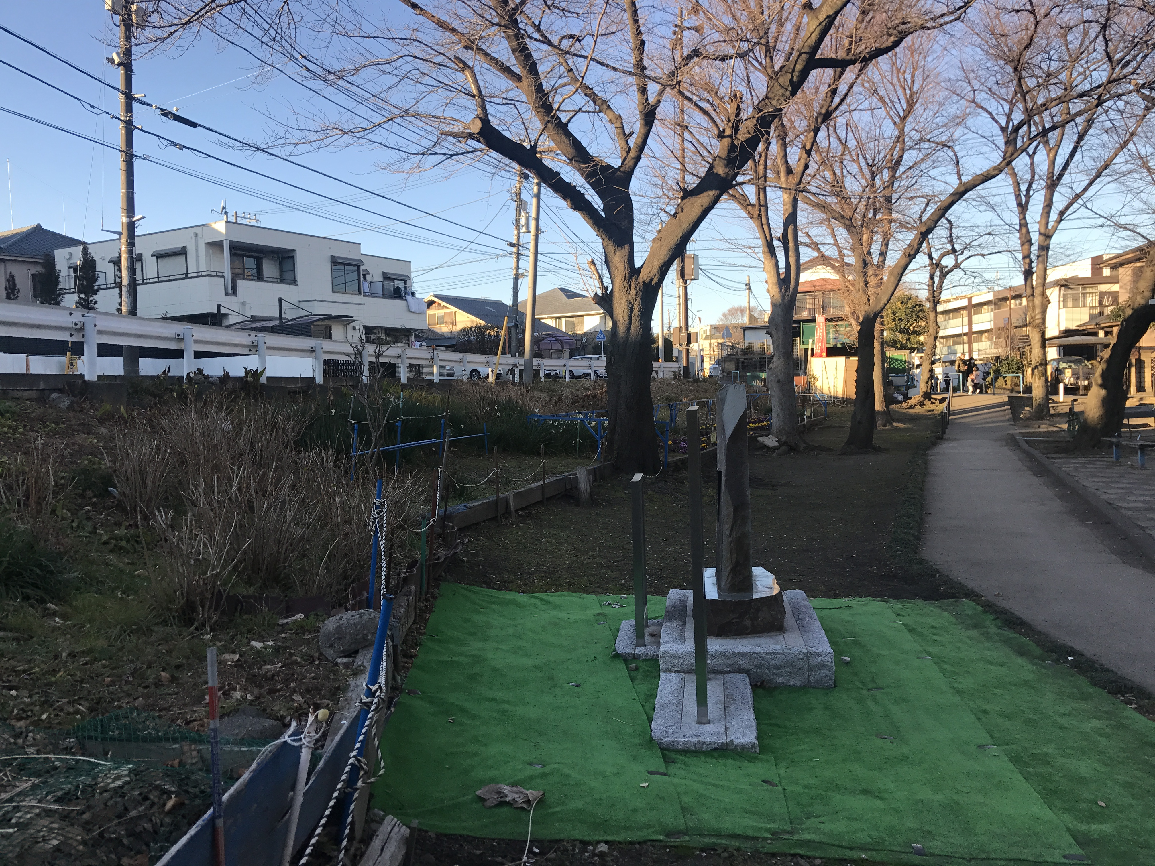 中丸子児童公園から撮影した有吉堤